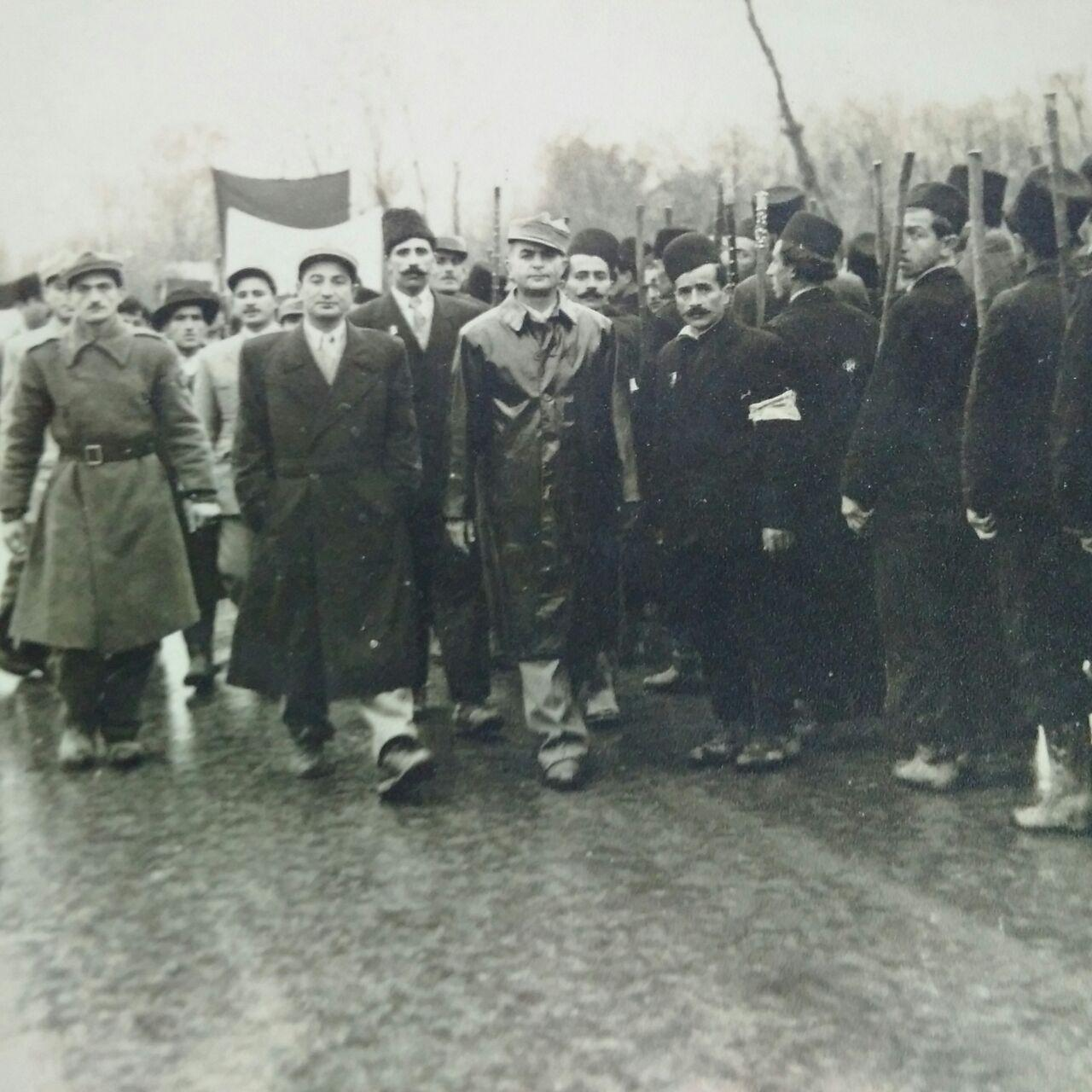 قنبر خان چهاردهی به همراهی قشونش